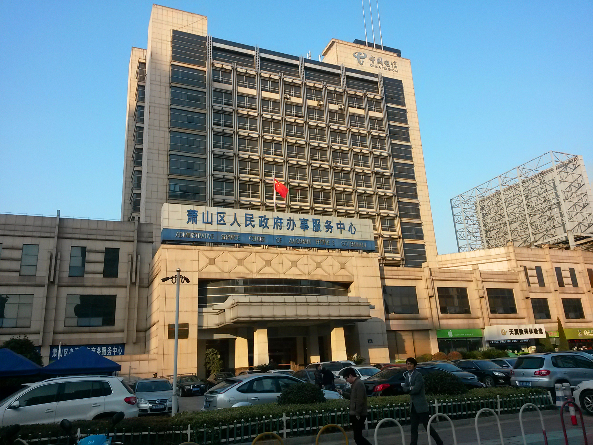 萧山区人民政府办事服务中心